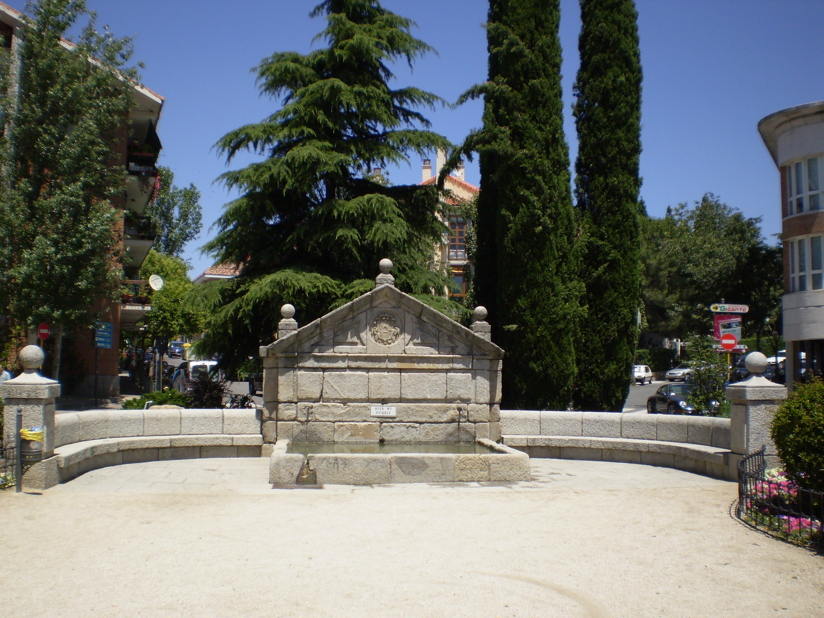 Fuente de El Caño. Torrelodones, Madrid, Spain